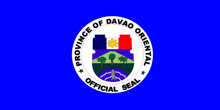 Dit materiaal is afkomstig van of en is door de auteur Jaume Ollé als GFDL beschikbaar gesteld, zie de toestemmingsemail. Hiermee vervallen de strictere voorwaarden in de disclaimers op de genoemde sites.Vrijgegeven bijdrage op Flags of the World van Jaume Olle. Zie deze verklaring op de Spaanstalige Wikipedia. GNU FDL